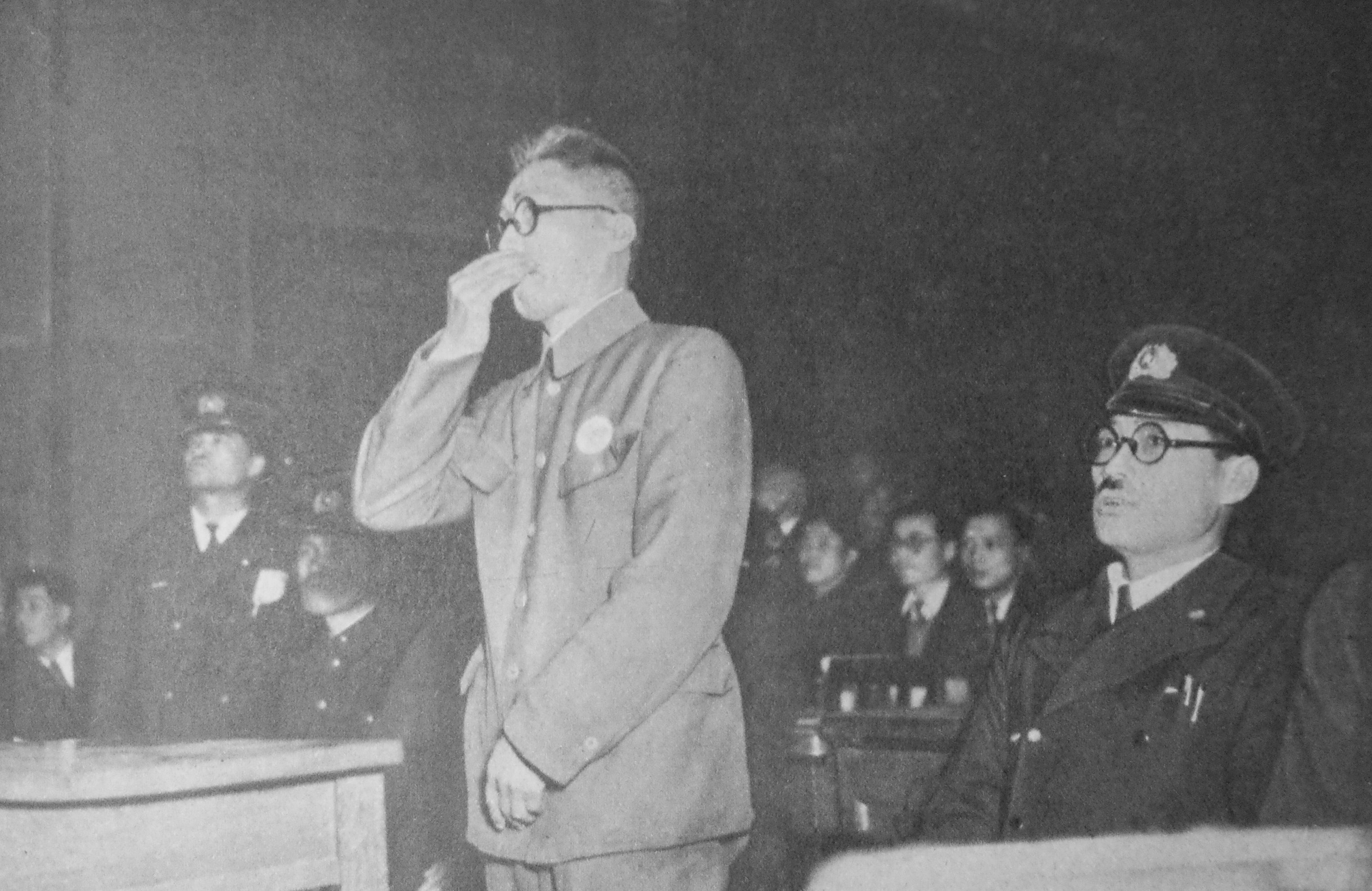 帝銀事件一審第1回公判での平沢貞通